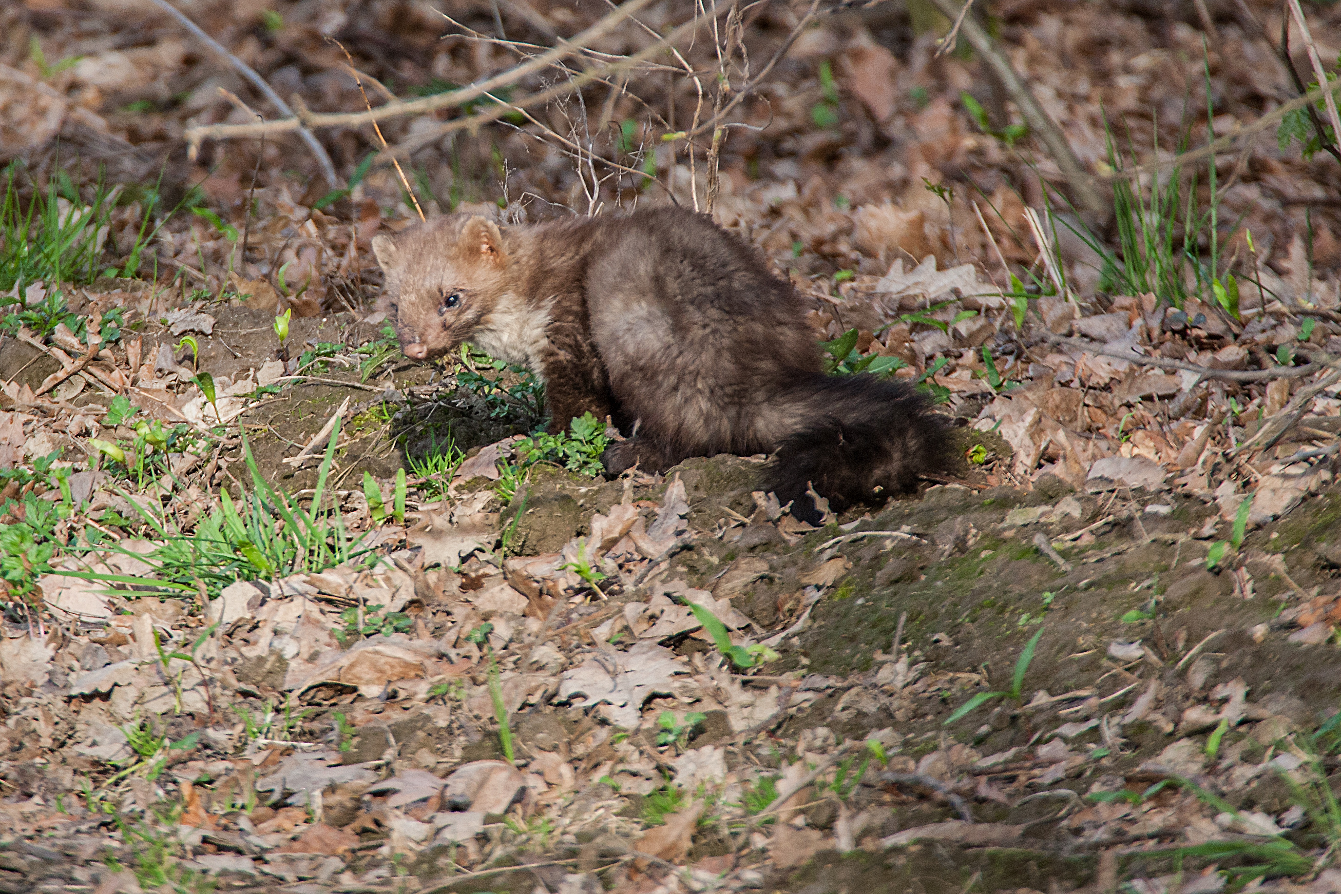 Kuna domowa, Łódź (Polska)